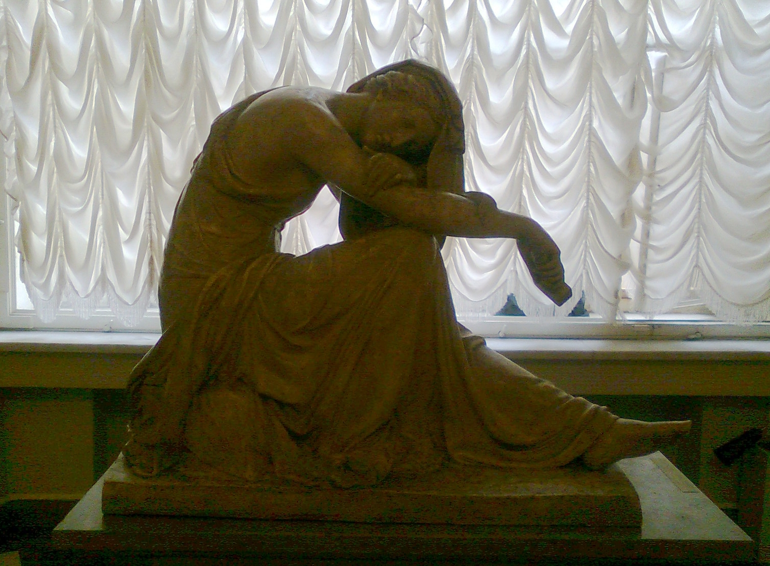 С.С. Пименов. «Проект надгробия М.И. Козловскому». 1802. ГРМ